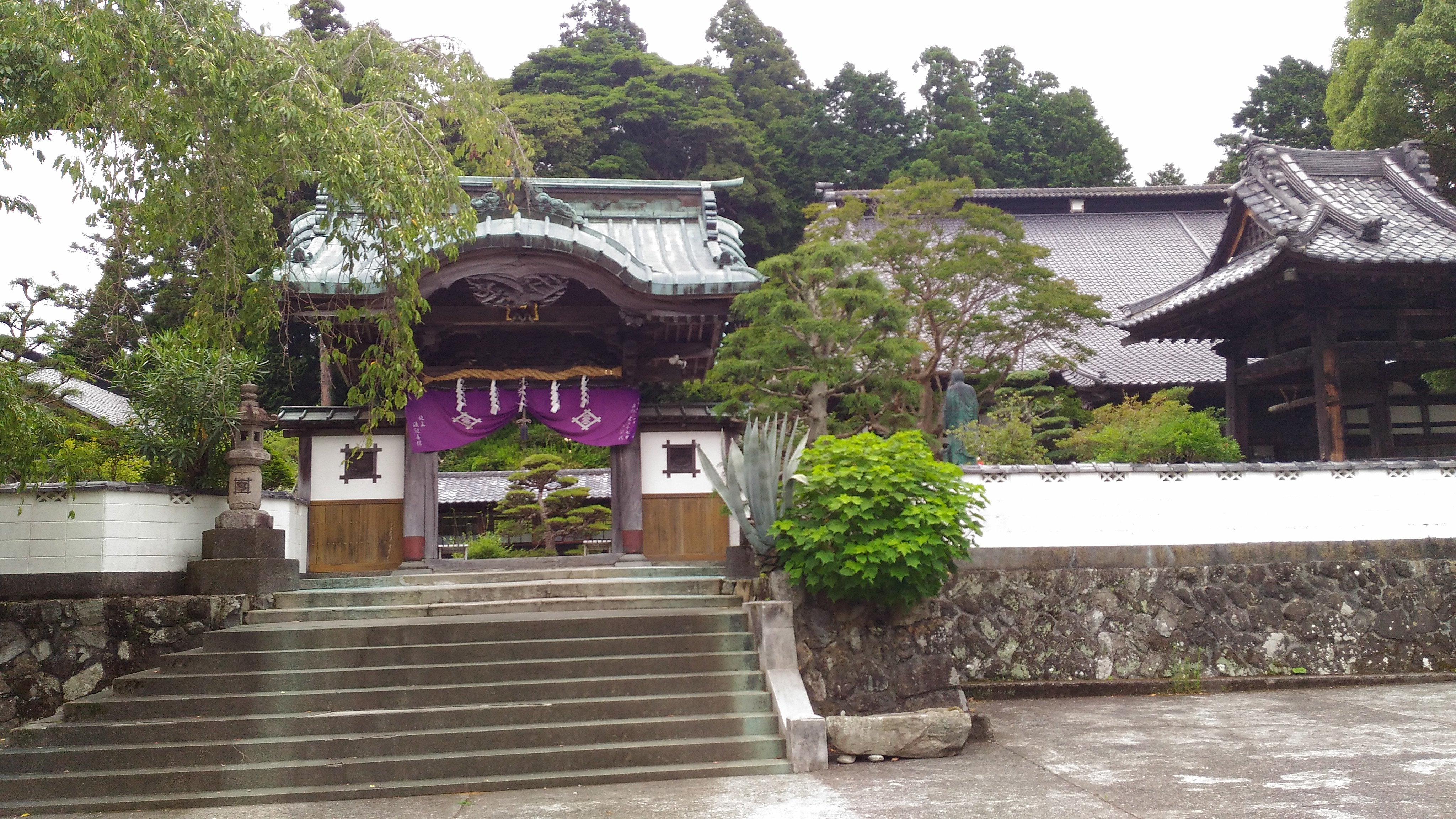 内船寺境内